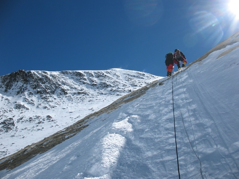 エベレスト南東稜、イエローバンド付近を登攀中。